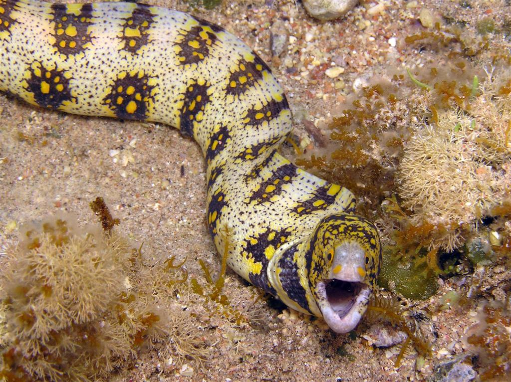 Sternfleckenmuräne (Echidna nebulosa), Egypt Spring 2005